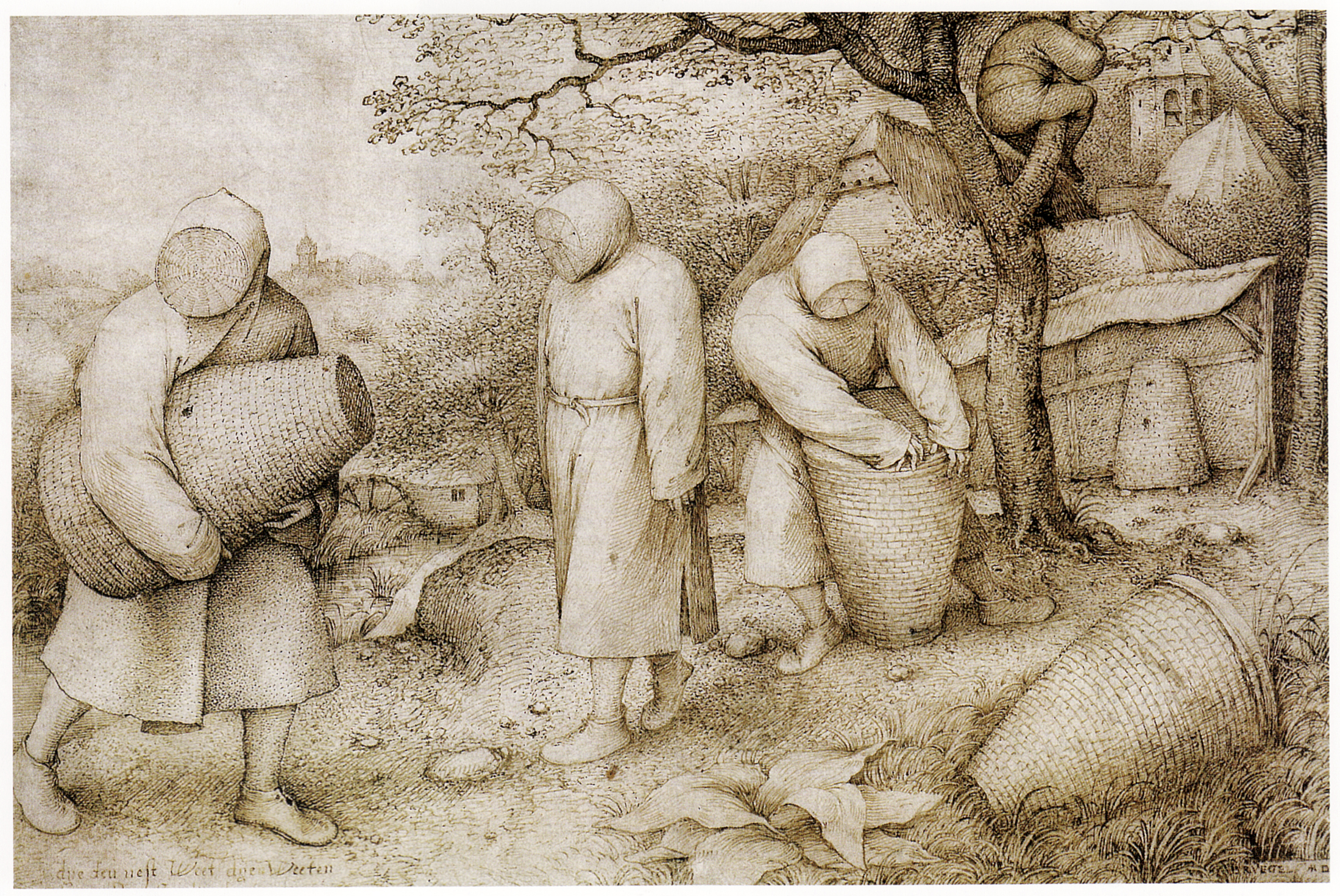 Das Blatt zeigt vermutlich einen Handlungsablauf.